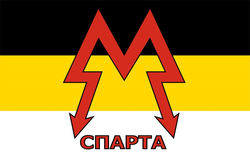 Спарта (батальон)